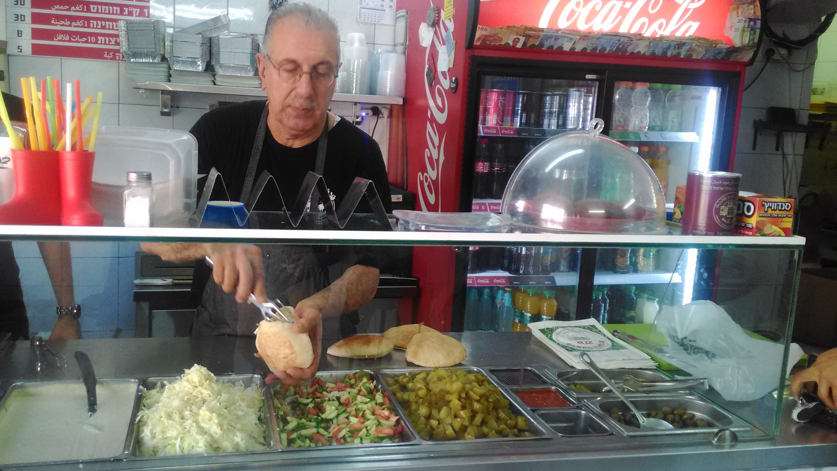 פלאפל הזקנים